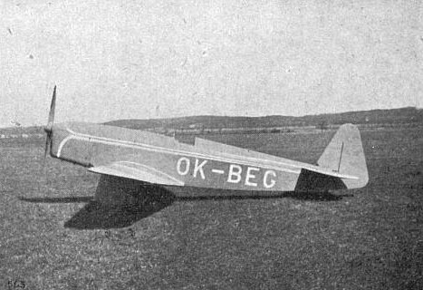 Beneš-Mráz Be-56 Beta-Major